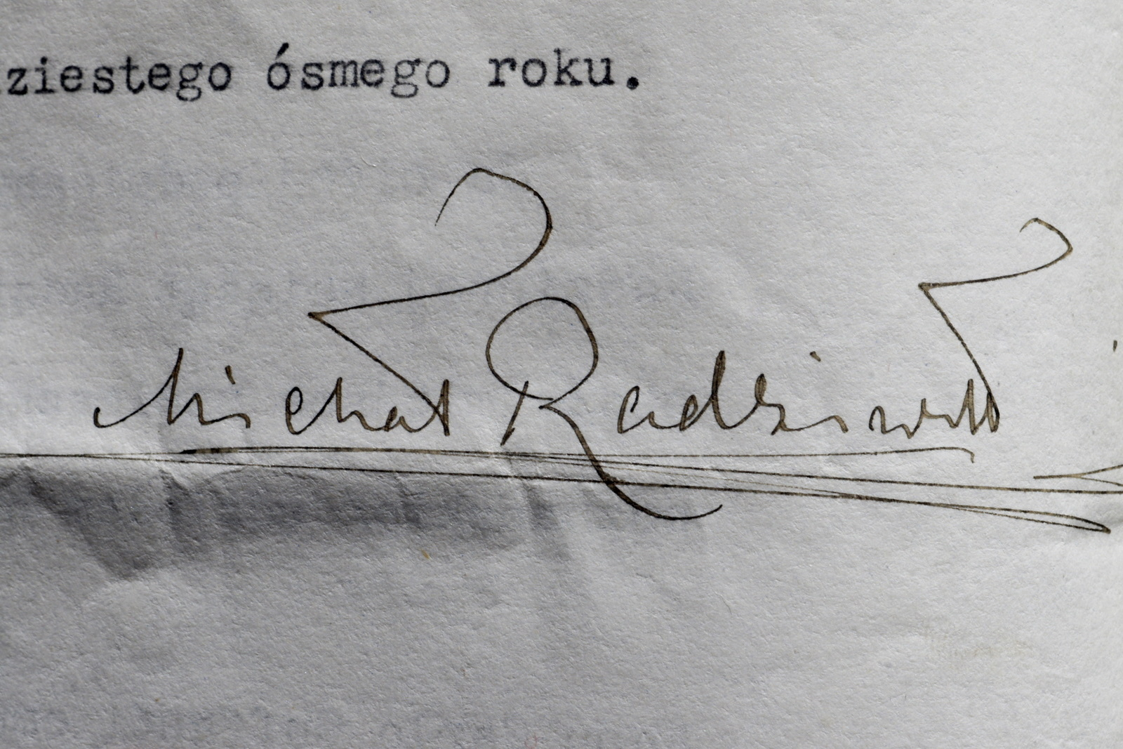 Autograf IV ordynata przygodzickiego ( pow. ostrowski ), Michała Radziwiłła pod dokumentem z 1938 r.